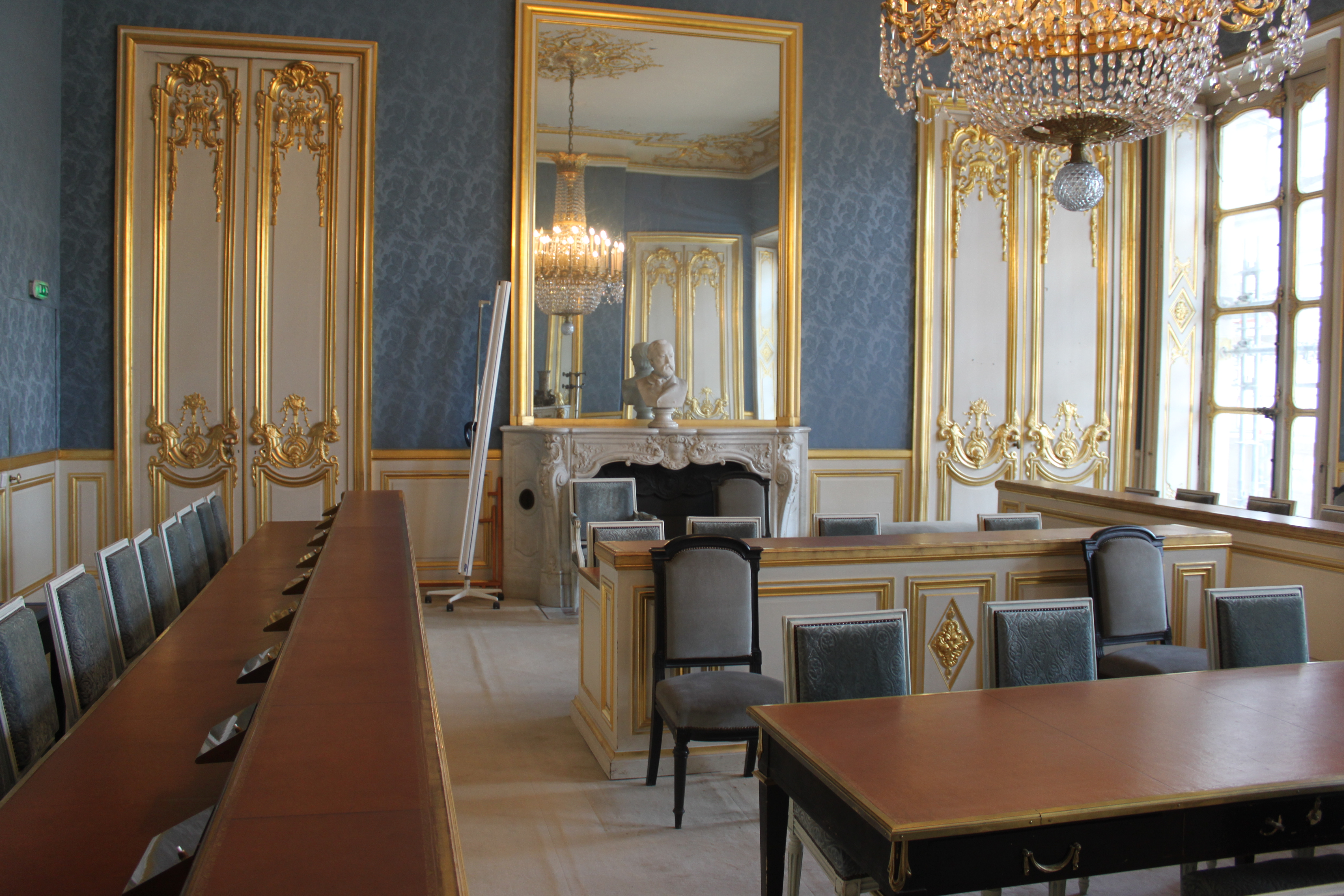 Salle de la section des finances du Conseil d'Etat au Palais Royal. Les vantaux de porte sont attribués à Pierre Contant d'Ivry.